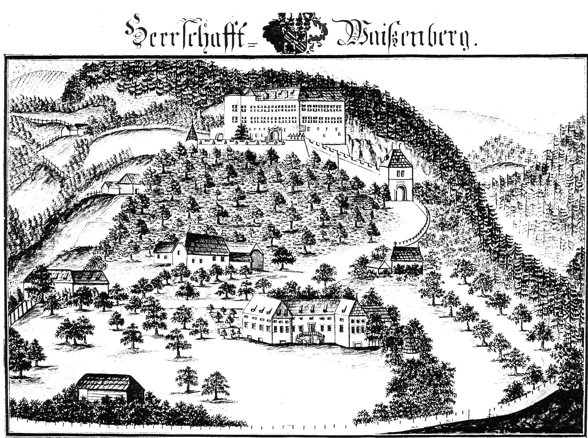 Waisenberg Zeichnung aus dem 17. Jhdt.